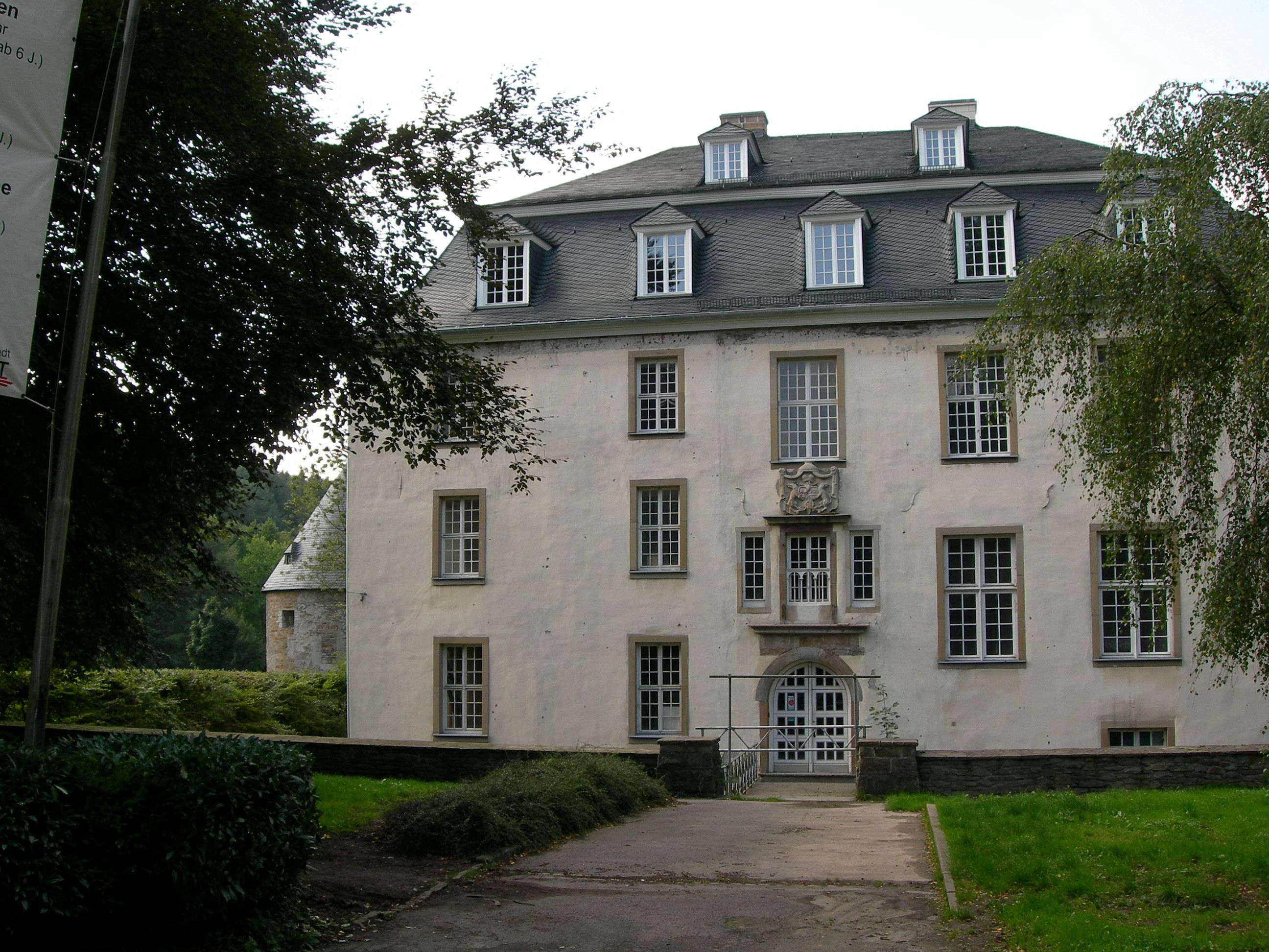 Schloss Hardenberg, Velbert Germany (Water Castle)